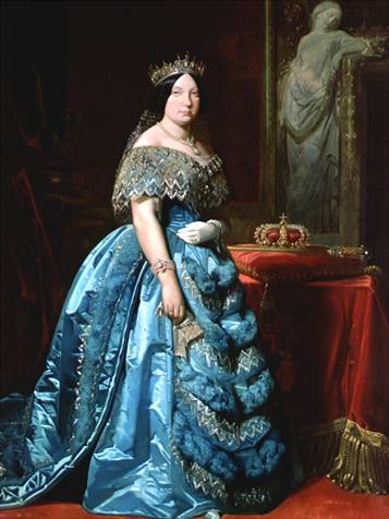 Retrato de la reina Isabel II de España (1830-1904), que fue reina de España desde 1833 hasta 1868 y era hija del rey Fernando VII de España y de María Cristina de Borbón-Dos Sicilias.